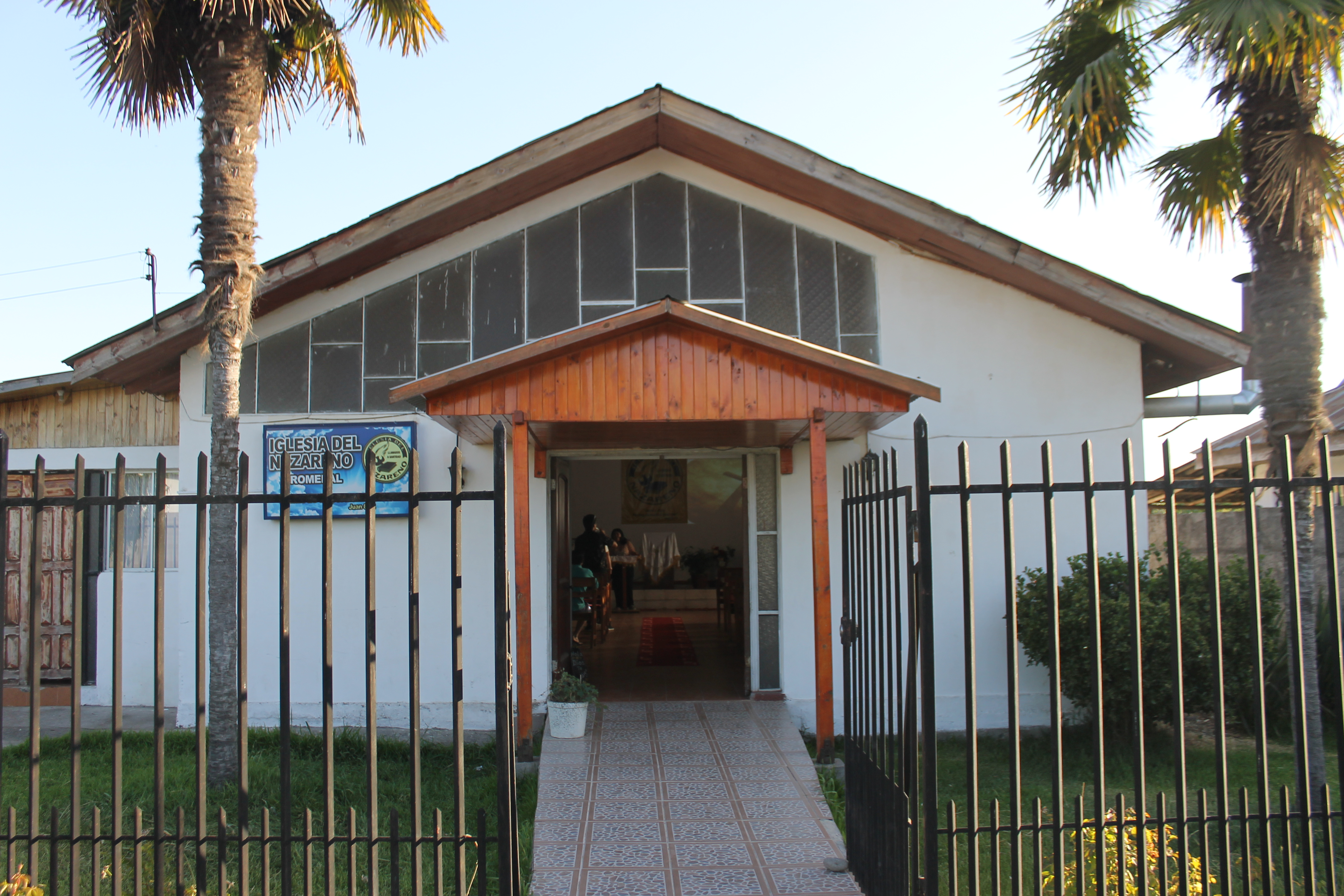 Iglesia Evangélica con más de 35 años de presencia en la comuna.